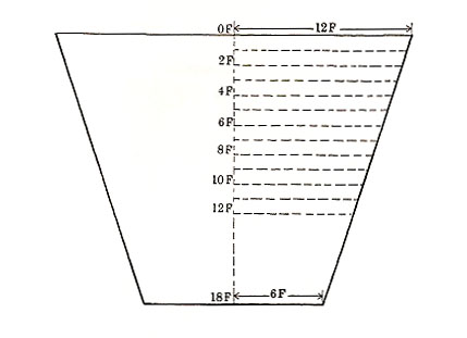 Section de la partie interne de la clepsydre du papyrus n° 470 d'Oxyrhynche